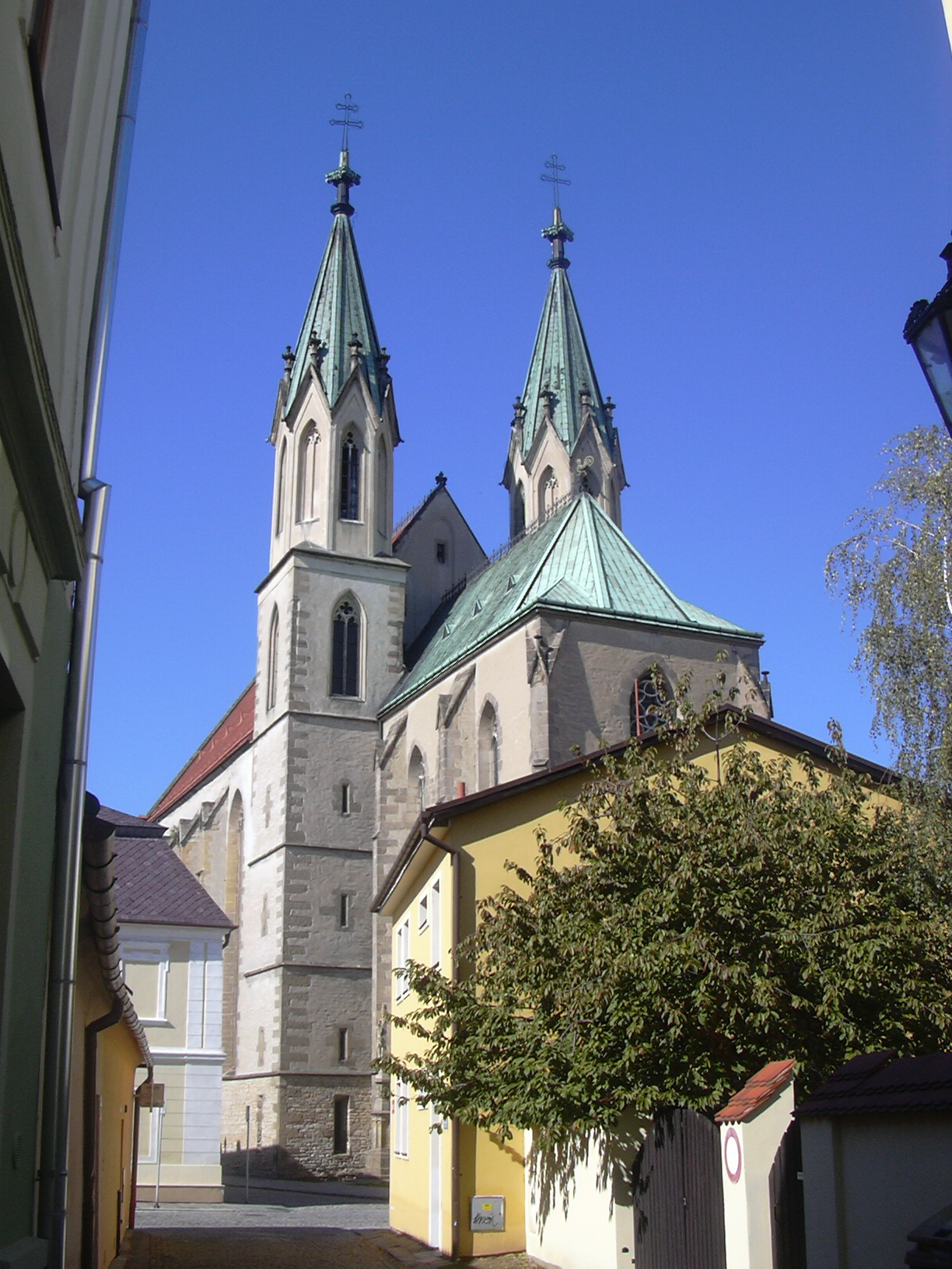 Kostel svatého Mořice v Kroměříži